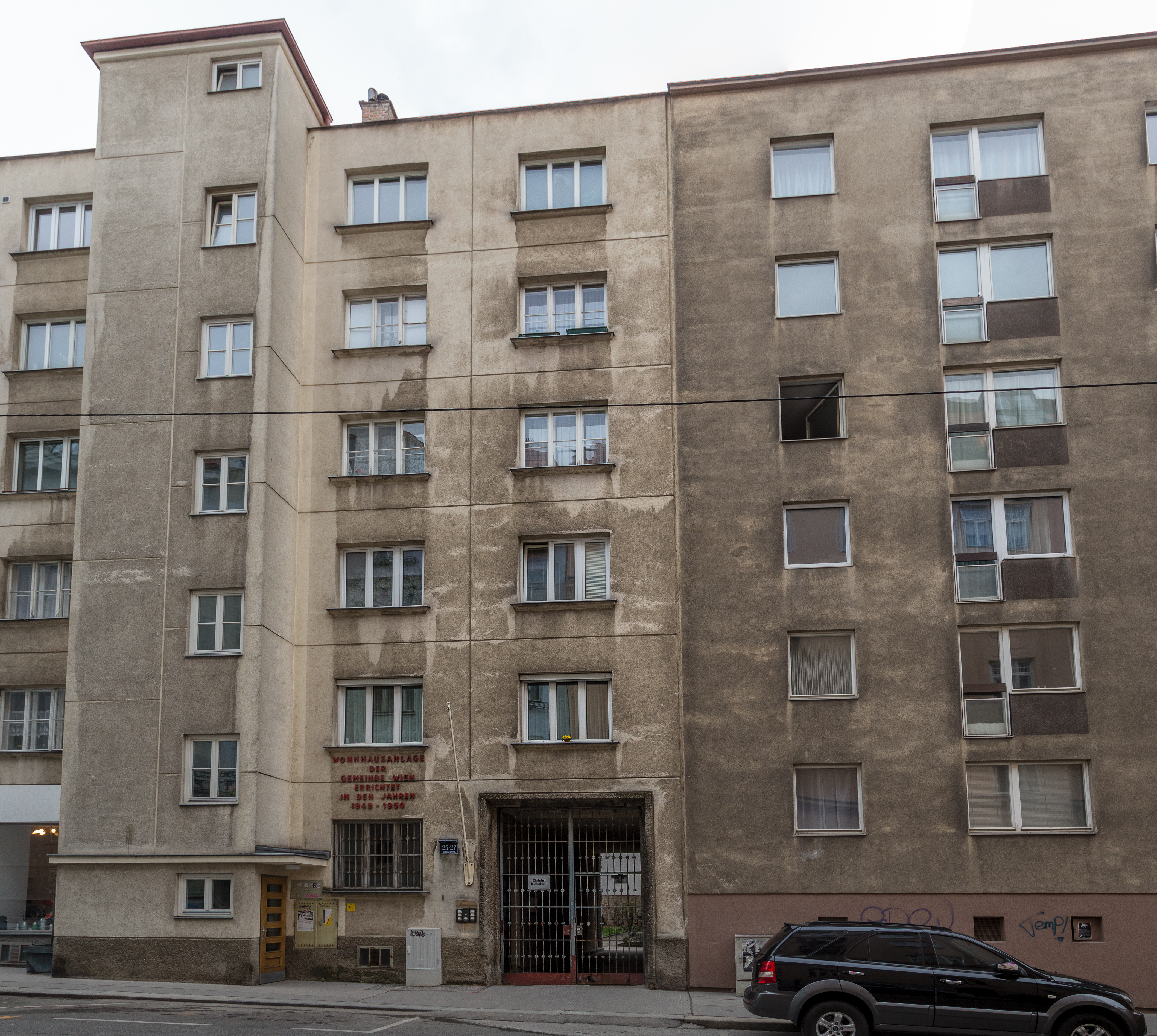 Blechturmgasse 23-27